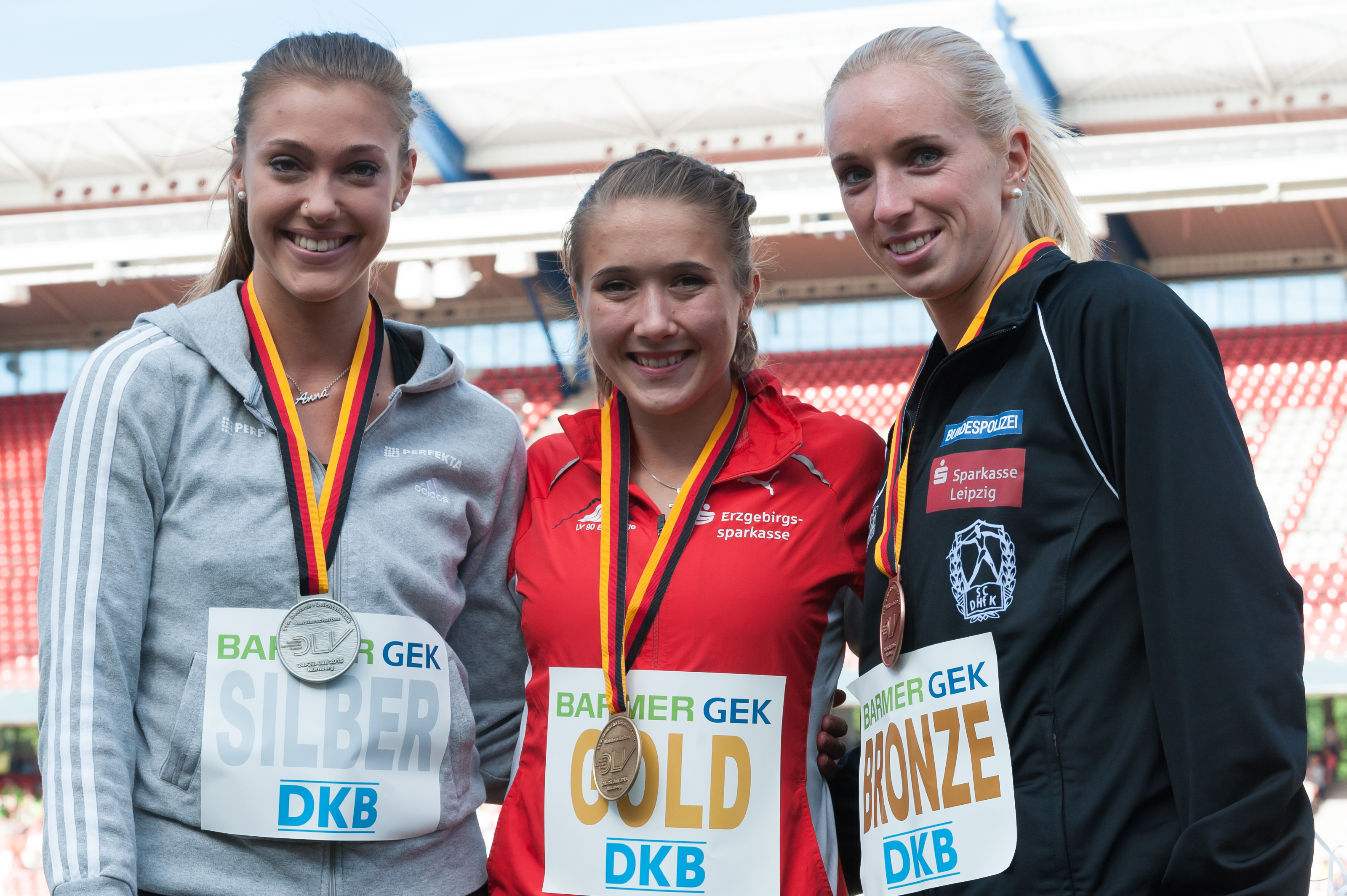 Deutsche Leichtathletik-Meisterschaften 2015: Frauen 200m - Rebekka Haase, Anna-Lena Freese, Cindy Roleder